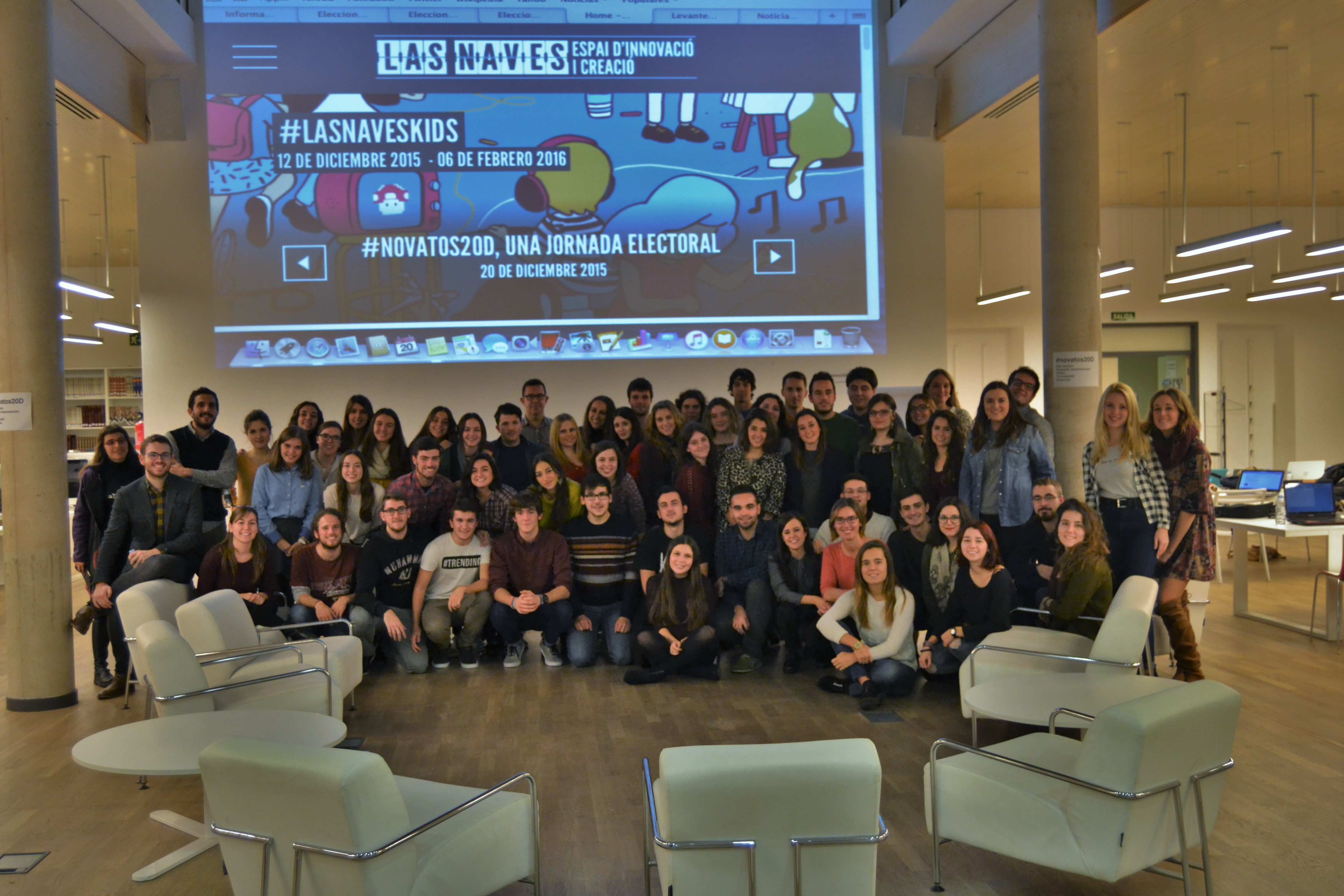 Foto de la redacción efímera creada para el proyecto Novatos 20D